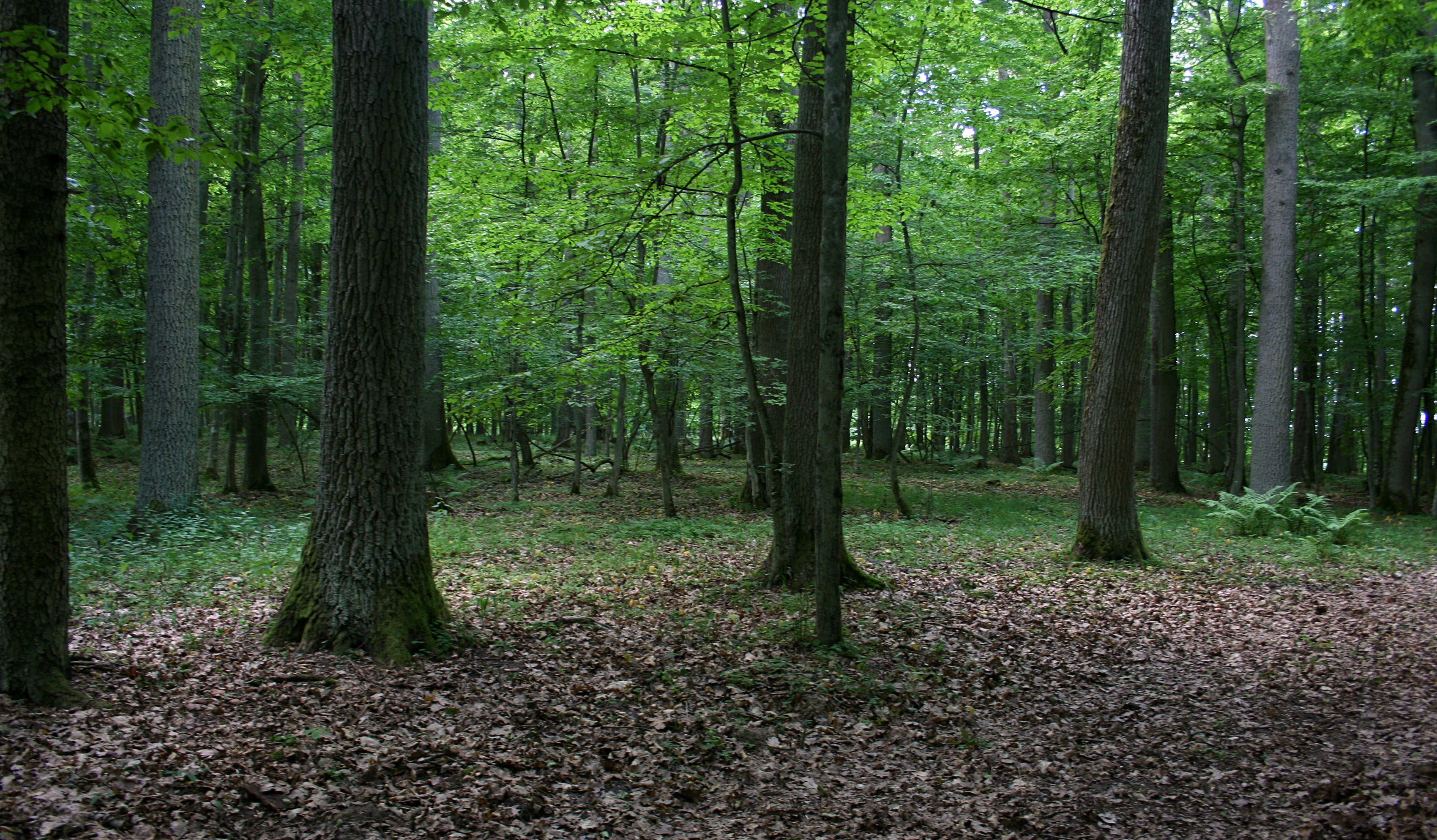 Rezerwat Brzęki (fragment) we Wdeckim Parku Krajobrazowym.